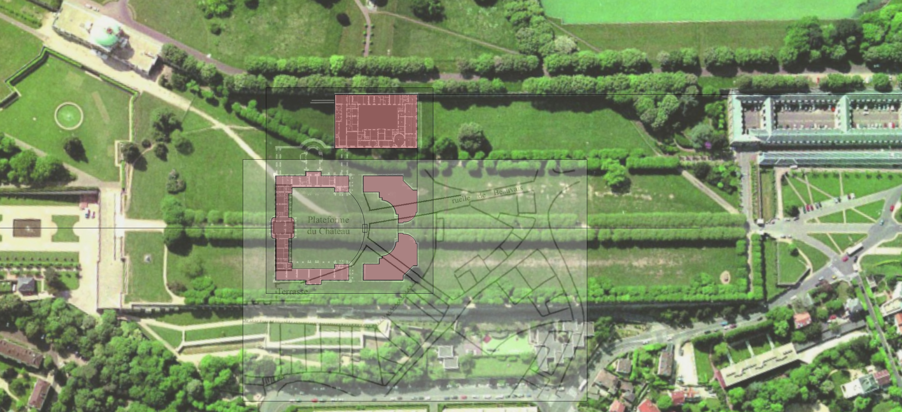 Plan archéologique de la Grande Terrasse de Meudon.